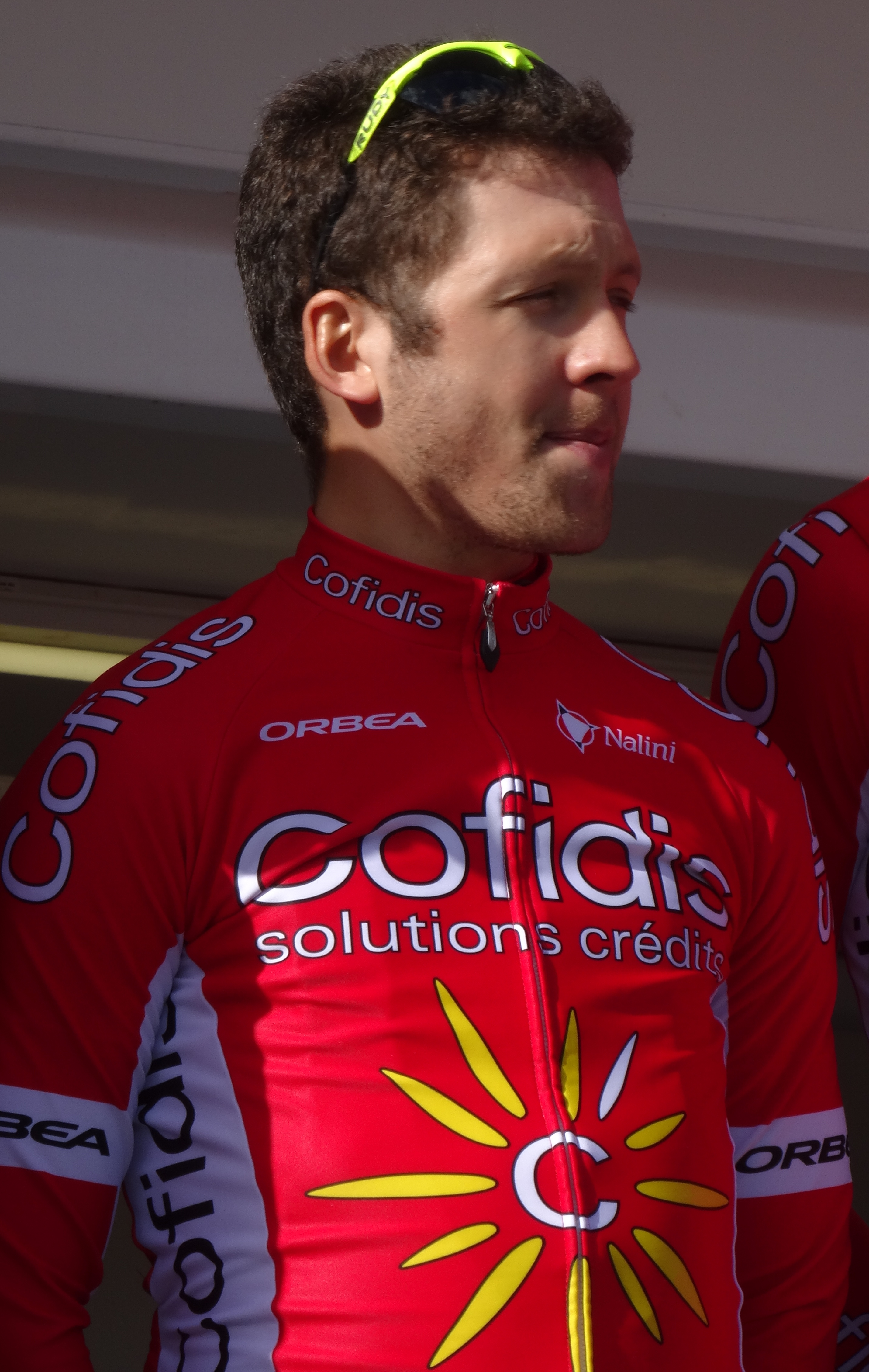 Reportage réalisé le mercredi 4 mars à l'occasion du départ du Samyn des Dames 2015 et du Samyn 2015 à Quaregnon, Belgique.